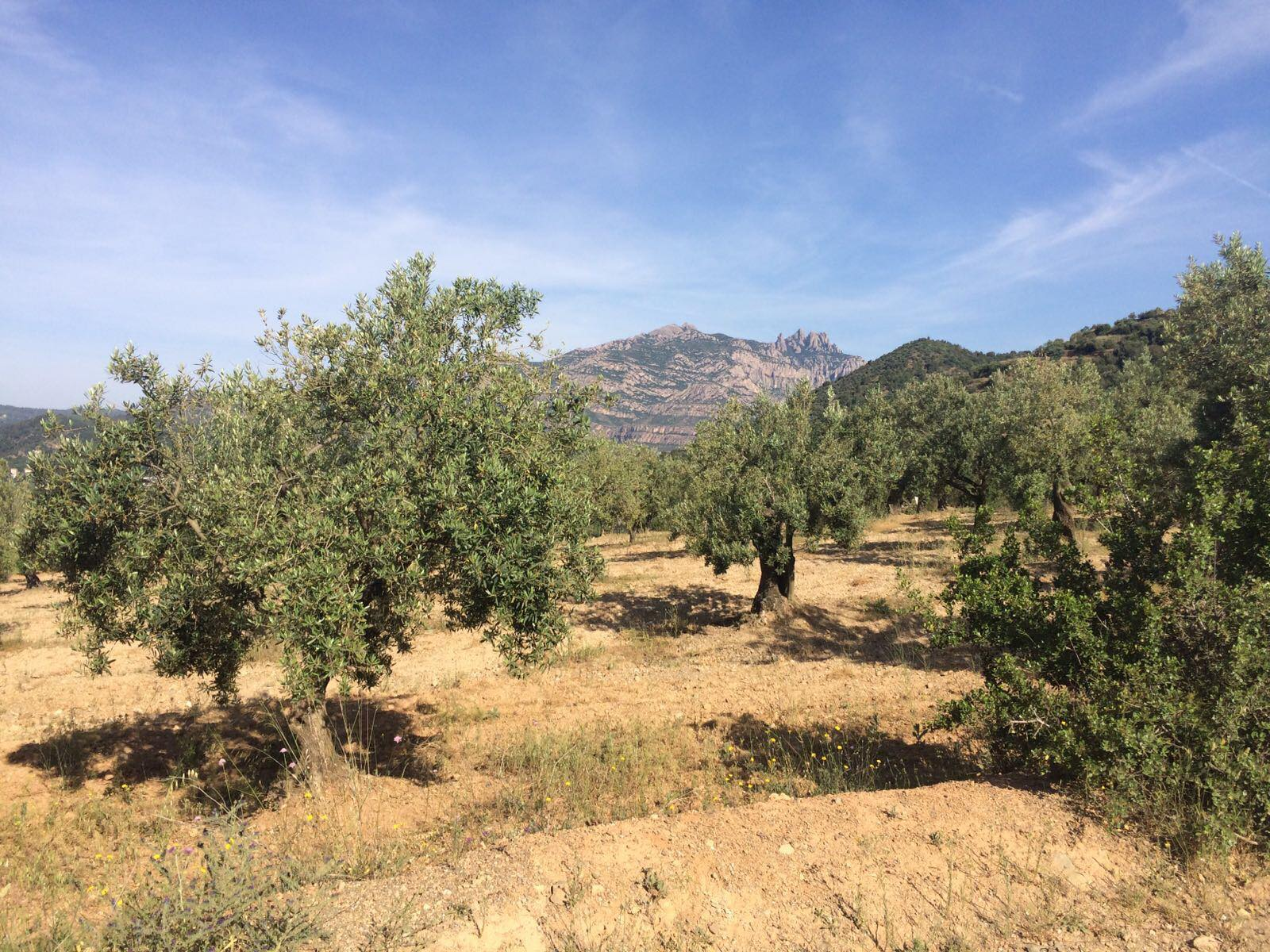 Oliveres de varietat Palomar des de Can Llimona, al fons la muntanya de Montserrat